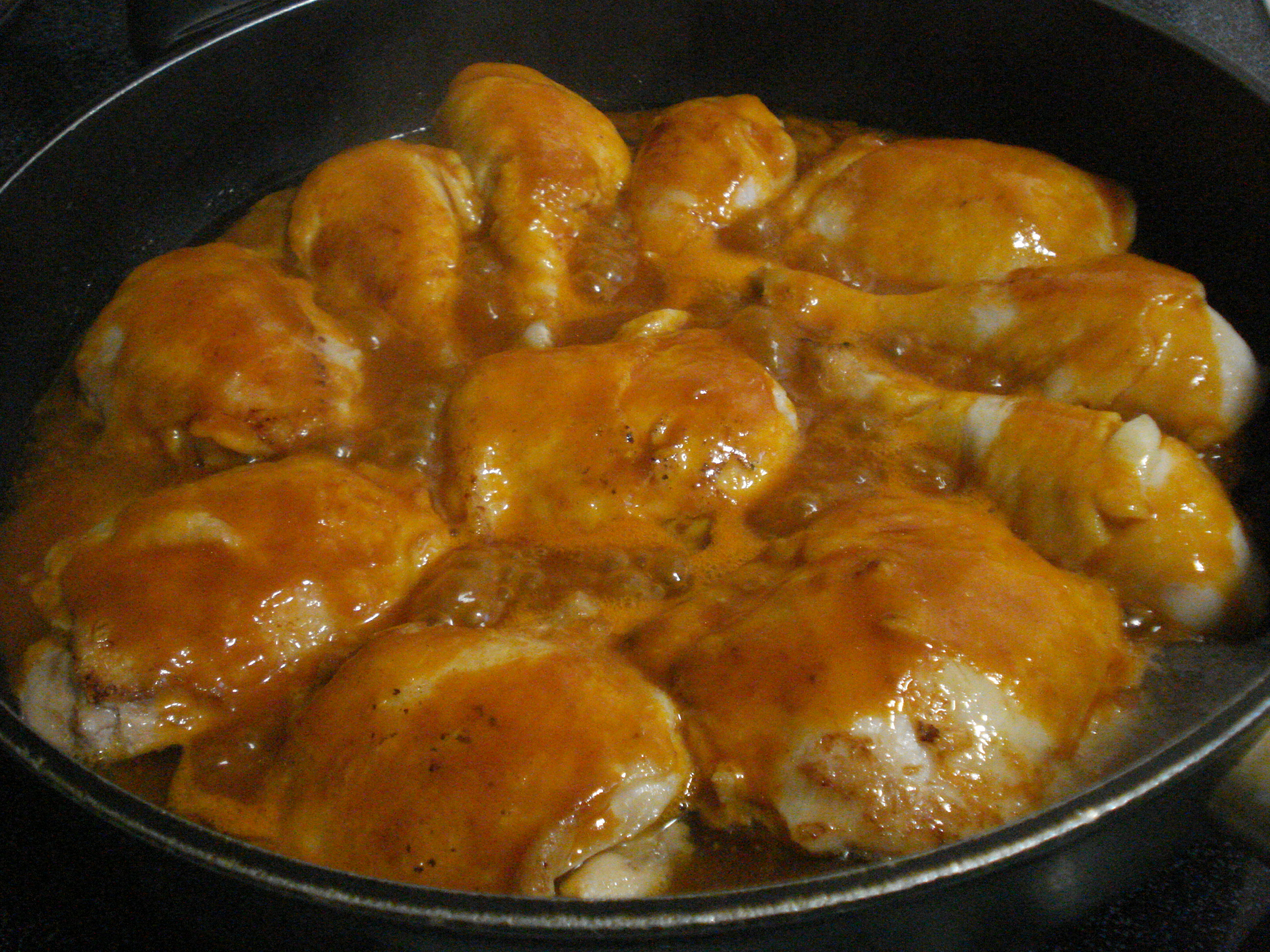 Poulet à la sauce moutarde